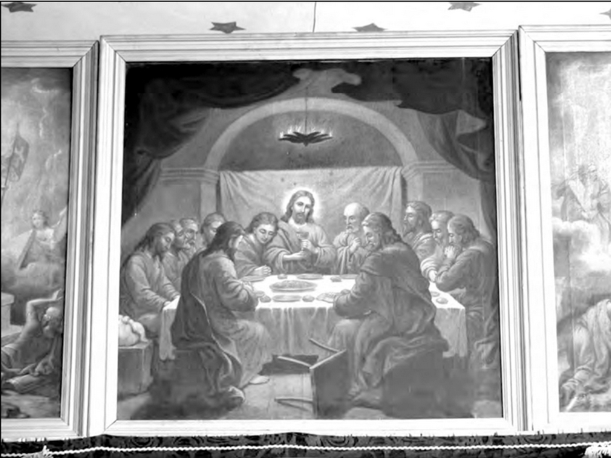 Cina cea de Taina – Biserica Sfântul Dumitru din Araci